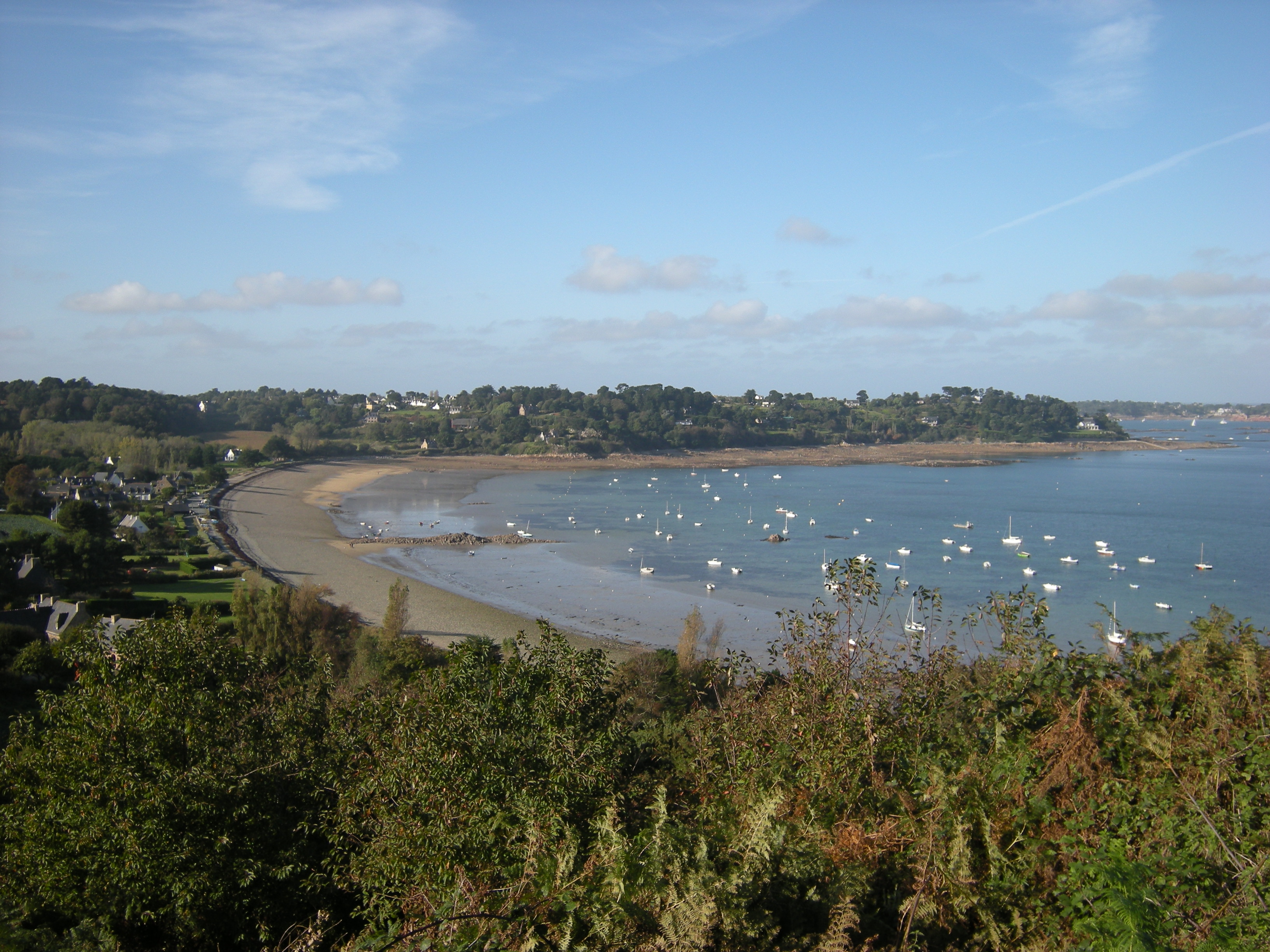 Ploubazlanec, Côtes-d'Armor, Bretagne, France. Vue vers le nord de l'anse de Launay, depuis la Croix des Veuves sur la pointe de la Trinité au nord de Pors-Even. En bord de plage, le village de Launay. L'anse est fermée au nord-nord-ouest par la Pointe de l'Arcouest, avec en face de nous le flanc sud-est de cette pointe (la façade nord-ouest de l'anse). Sur cette façade nord-ouest de l'anse, côté gauche, presque sur la plage : la petite maison aux murs roses est la maison du parc ; à sa droite, toujours près de la plage : 'Roc'h Ar Had', la maison construite en 1904 par Louis Lapicque ; à la droite de celle-ci, assez près de la plage : la maison de Marie Curie ; tout à fait à la pointe : la maison des Betttencourt. L'île Saint-Riom n'est pas visible, elle se trouve derrière nous légèrement sur la droite.